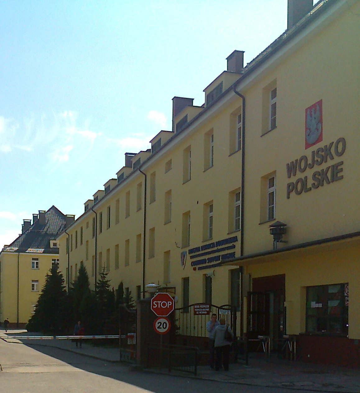 Brygada Wsparcia Dowodzenia Wielonarodowego Korpusu Północno-Wschodniego